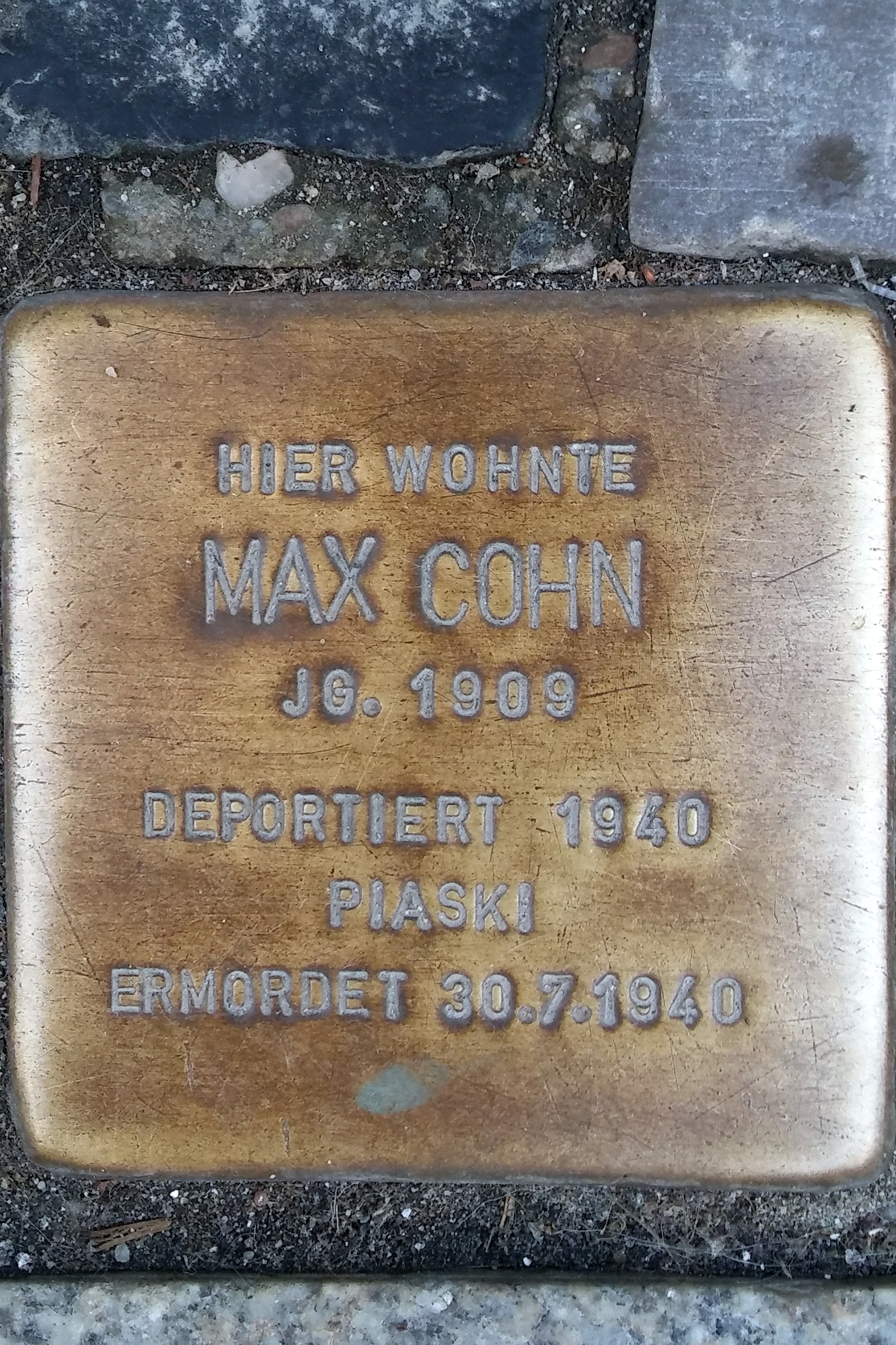 Stralsund, Mönchstraße 37, Stolperstein Max Cohn